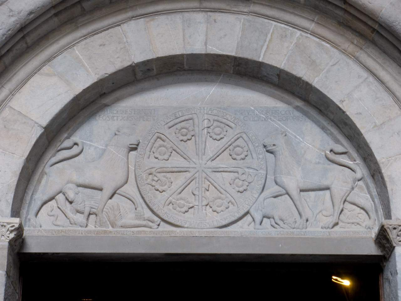 Catedral de Jaca